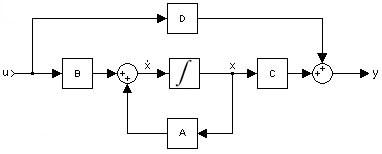 Ilustracja równań stanu dla układu ciągłego